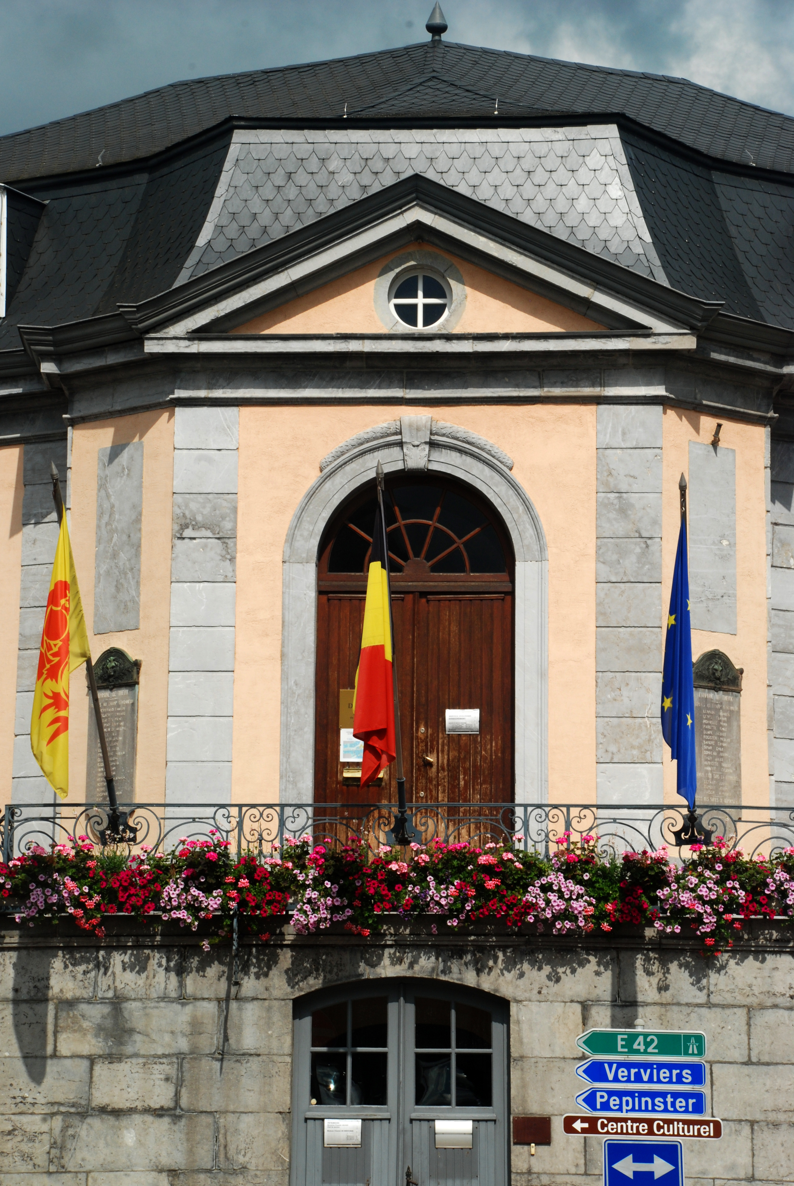 Belgique - Wallonie - Hôtel de ville de Theux